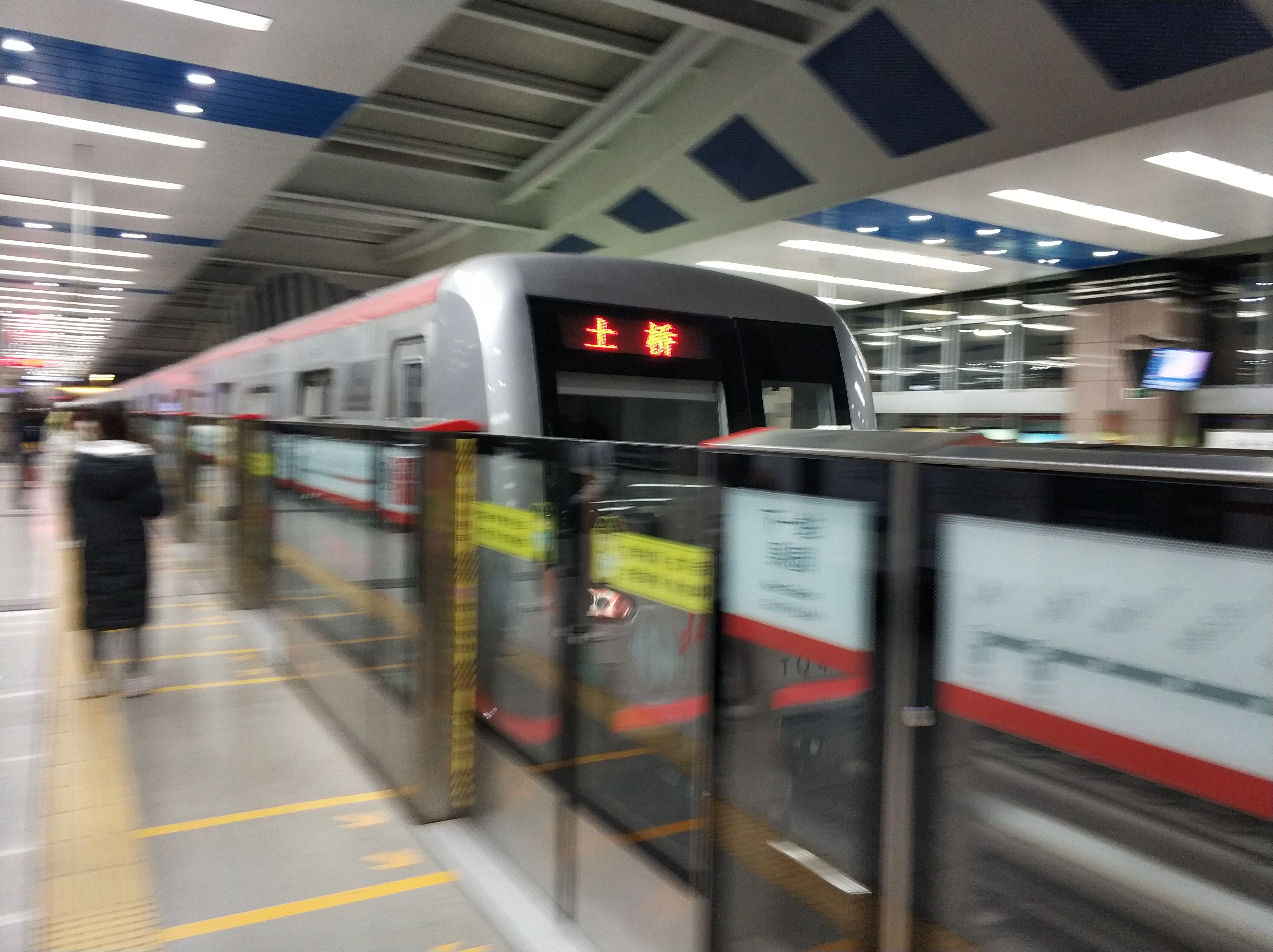 中文（中国大陆）: TQ431号车驶入通州北苑站。